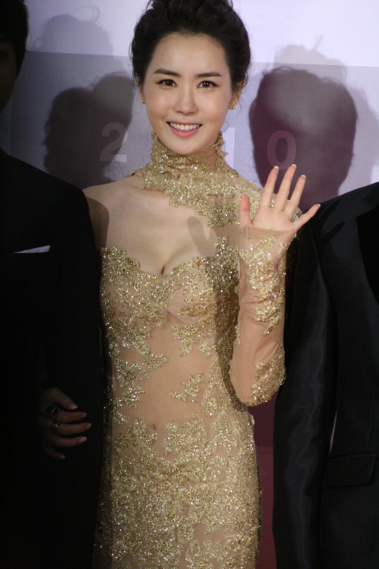 2010 KBS 연기대상